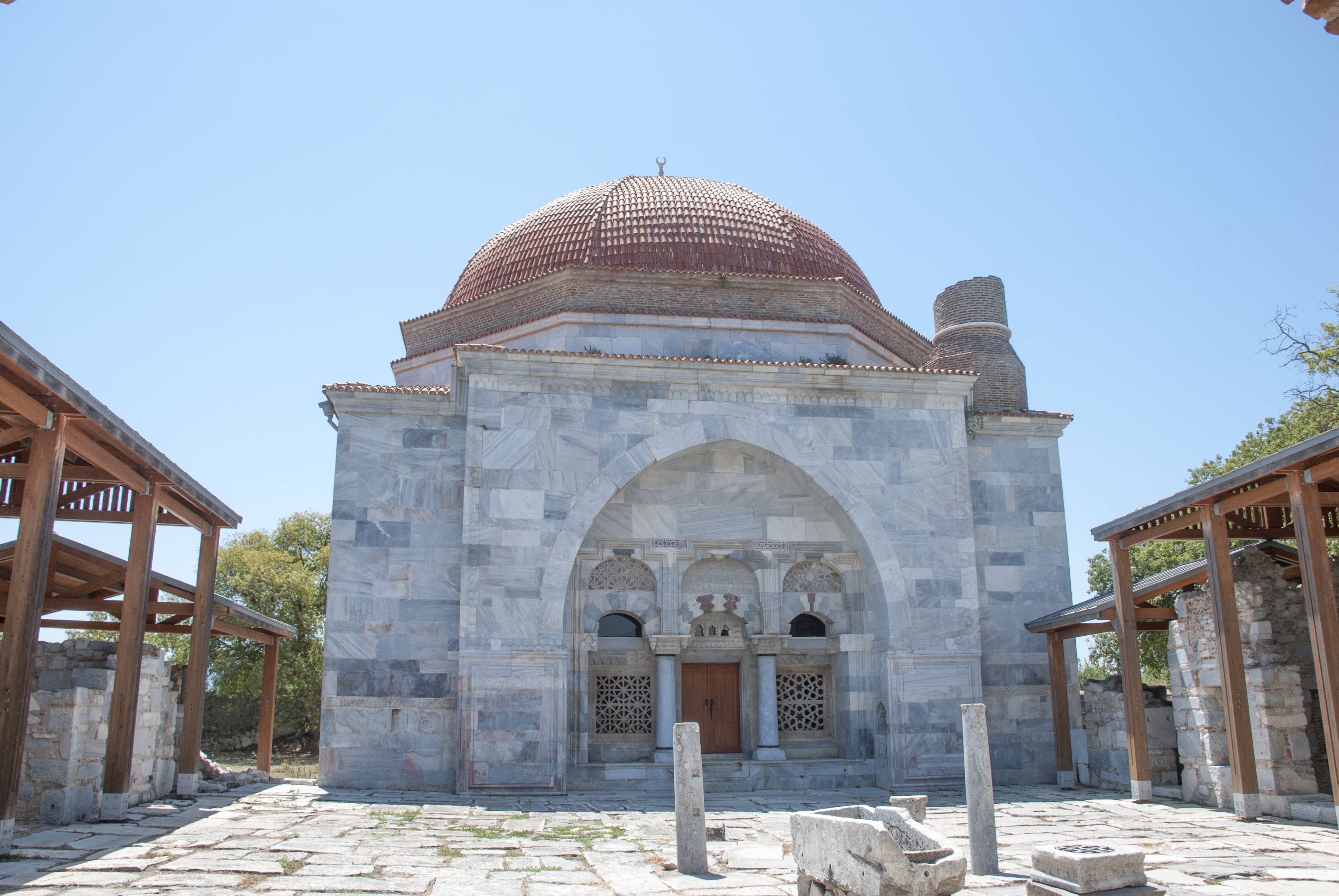 Milet antik kenti yakınlarında İlyas Bey Külliyesi